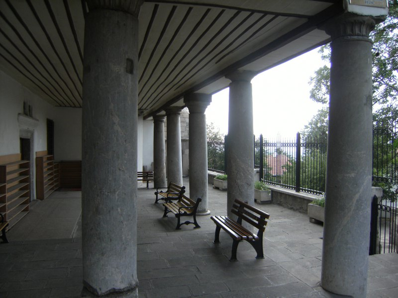 Sultan Alaeddin Cami, Ankara , Türkiye